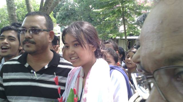 Tulika Gogoi